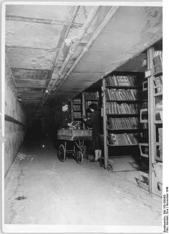 Berlin, Staatsbibliothek, Magazin Öffentlich-Wissenschaftliche Bibliothek im Wiederaufbau (siehe Begleittext) UBz: Das Magazin enthält die Literatur aus aller Welt und aller Sparten der Kunst und Wissenschaft, die je geschrieben wurde. Der Raum, der diese Werke enthält umfasst das Geviert Charlottenstraße - Unter den Linden-Dorotheenstraße. Auch hier war alles zerstört- Bestellte Bücher werden mit dem Bücherkarren aus dem Magazin geholt und zur Ausgabe gebracht. Aufn.: Illus Kemlein 8 4619-49 Nov.49 Leihweise Illus Berlin W [Extra-Information: Regalsystem mit Lipman-Regalen]